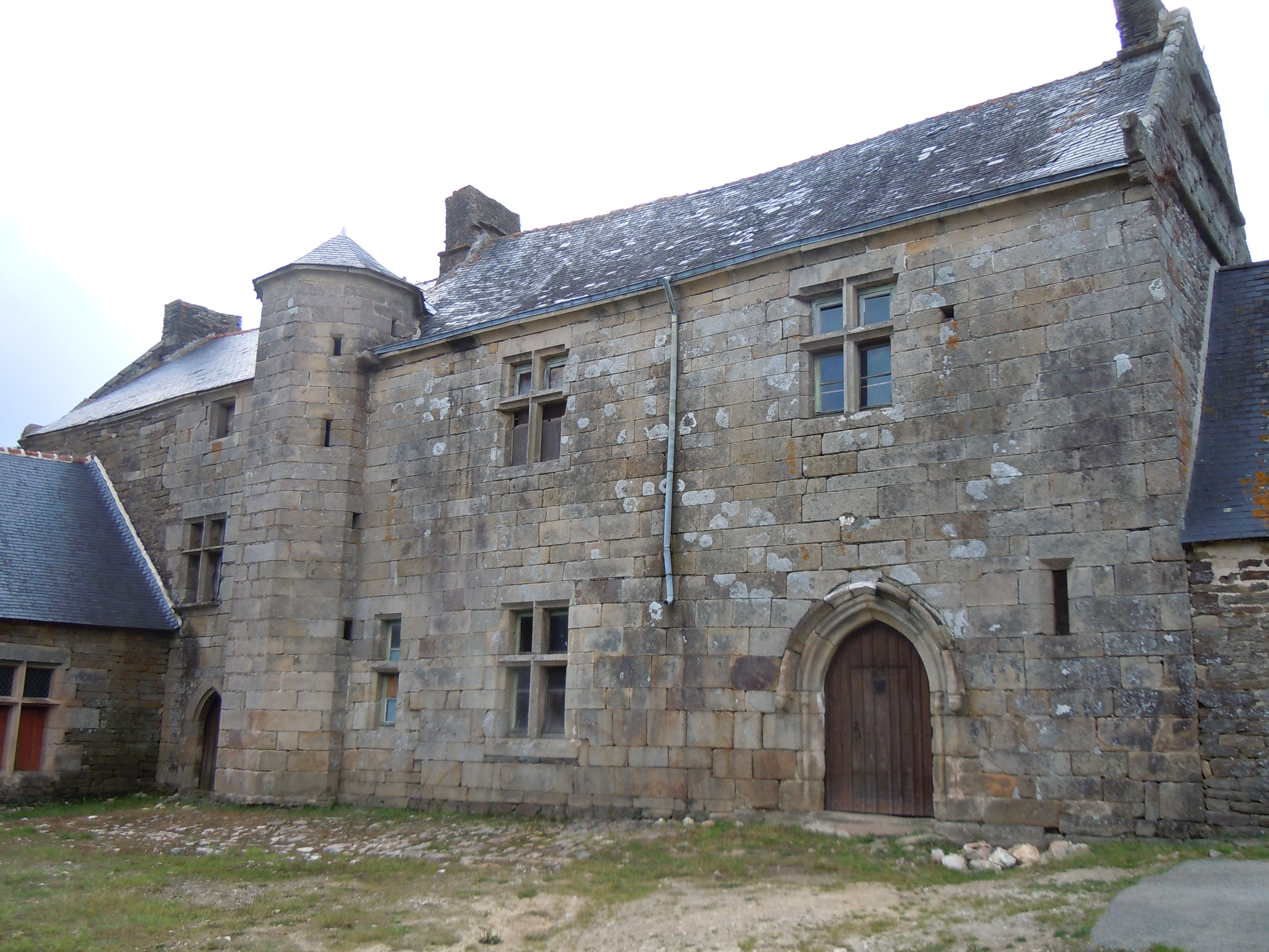 manoir de Menguionnet, commune de Gourin, département du Morbihan, France